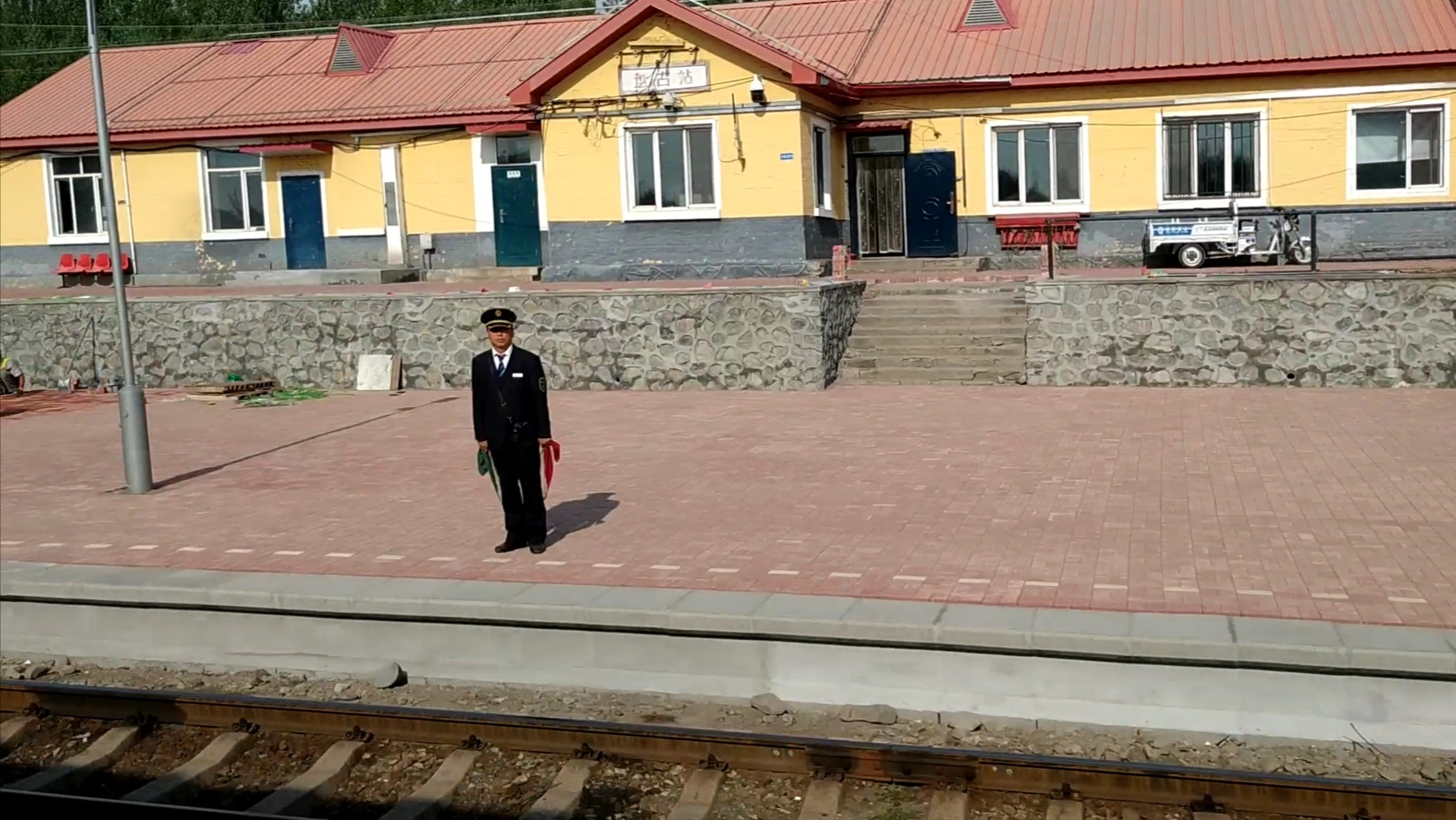 中文（中国大陆）: 富西铁路上的盘古站